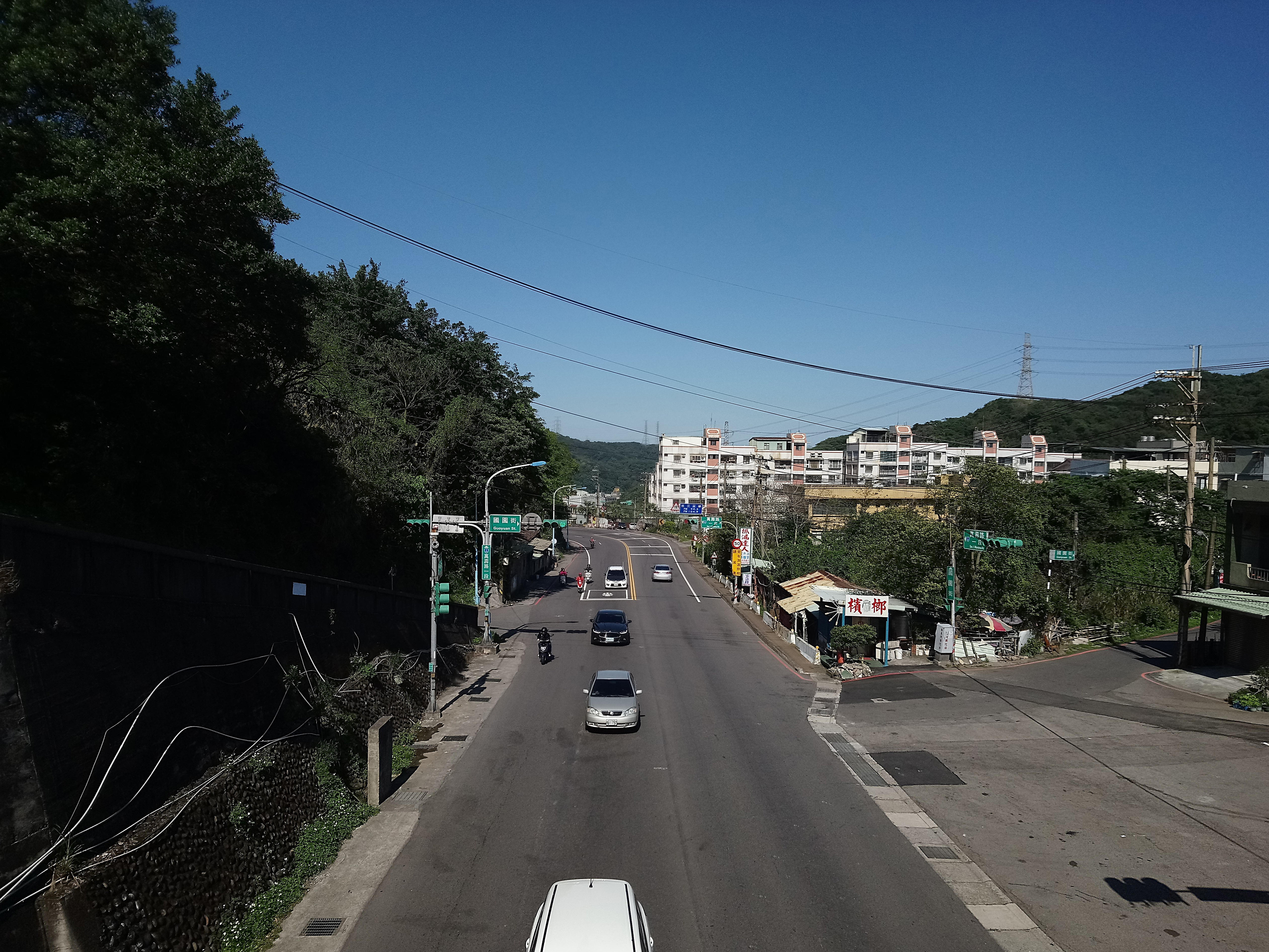 經過桃園市龜山區的臺1甲線,桃園市龜山區嶺頂里